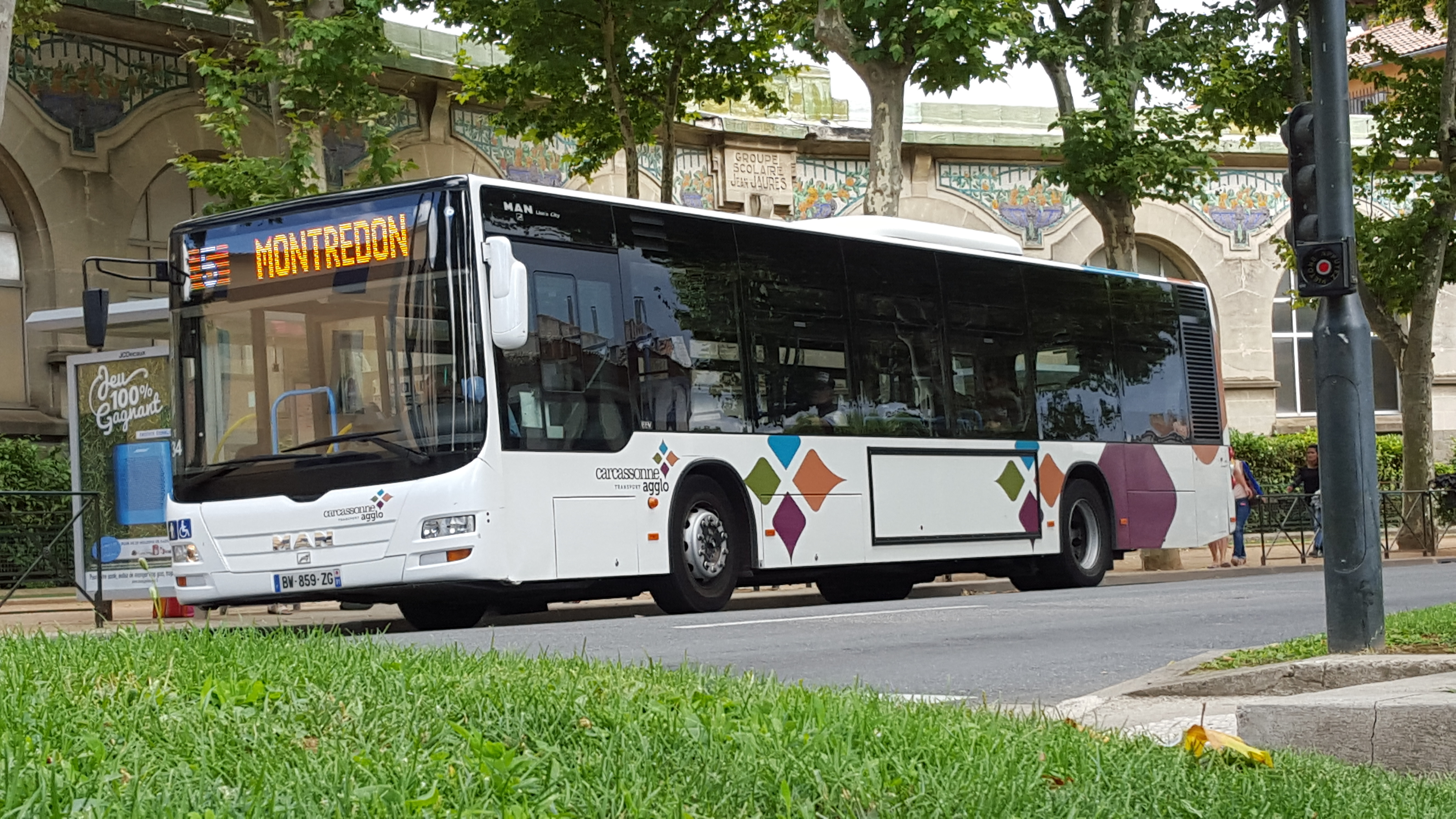 Man Lion's City n°34 du réseau de Carcassonne à l'arrêt "Jean Jaurès" sur la ligne 5 à destination de "Montredon"